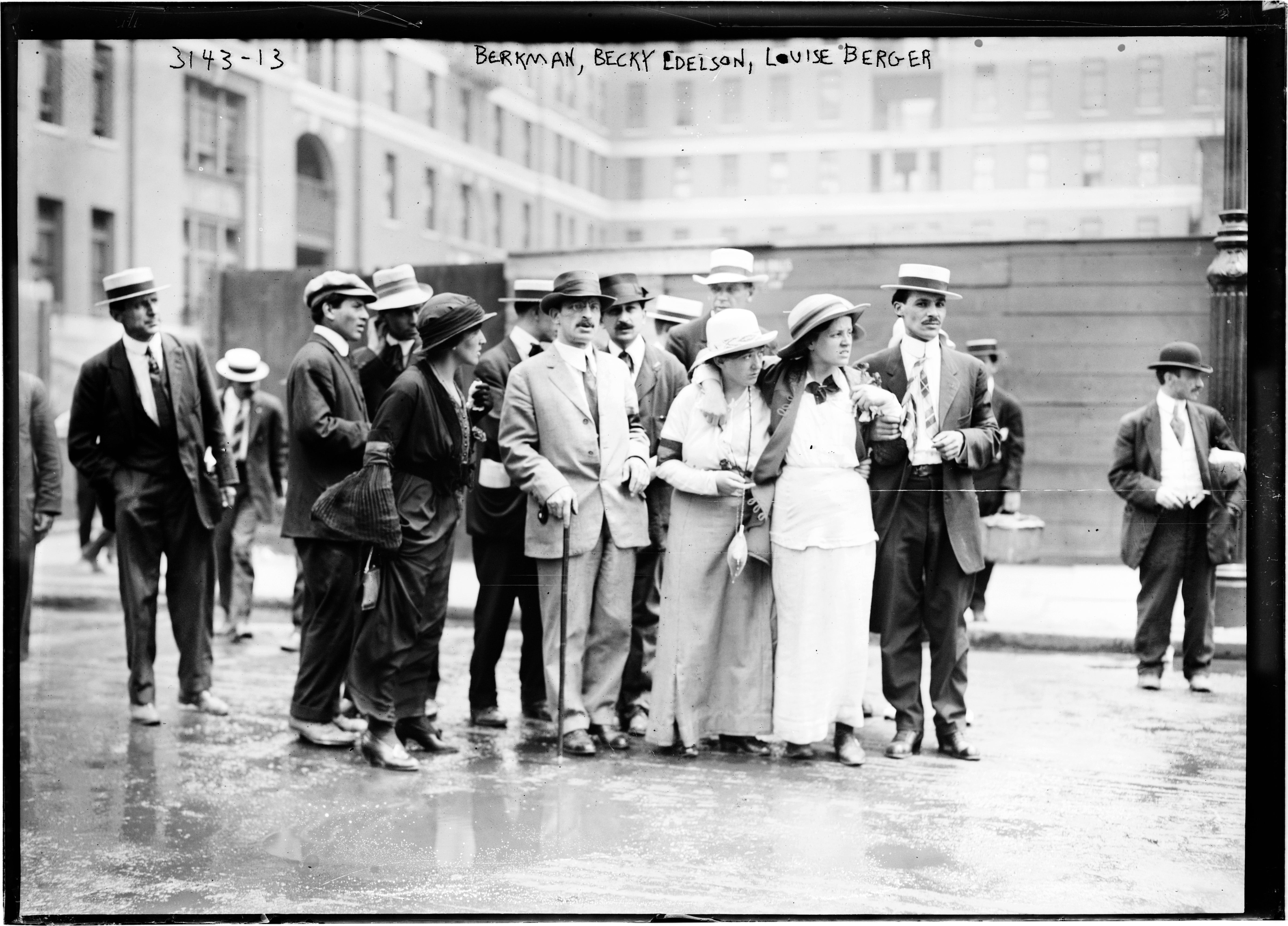 People Lillian Rubel Alexander Berkman Becky Edelson Louise Berger